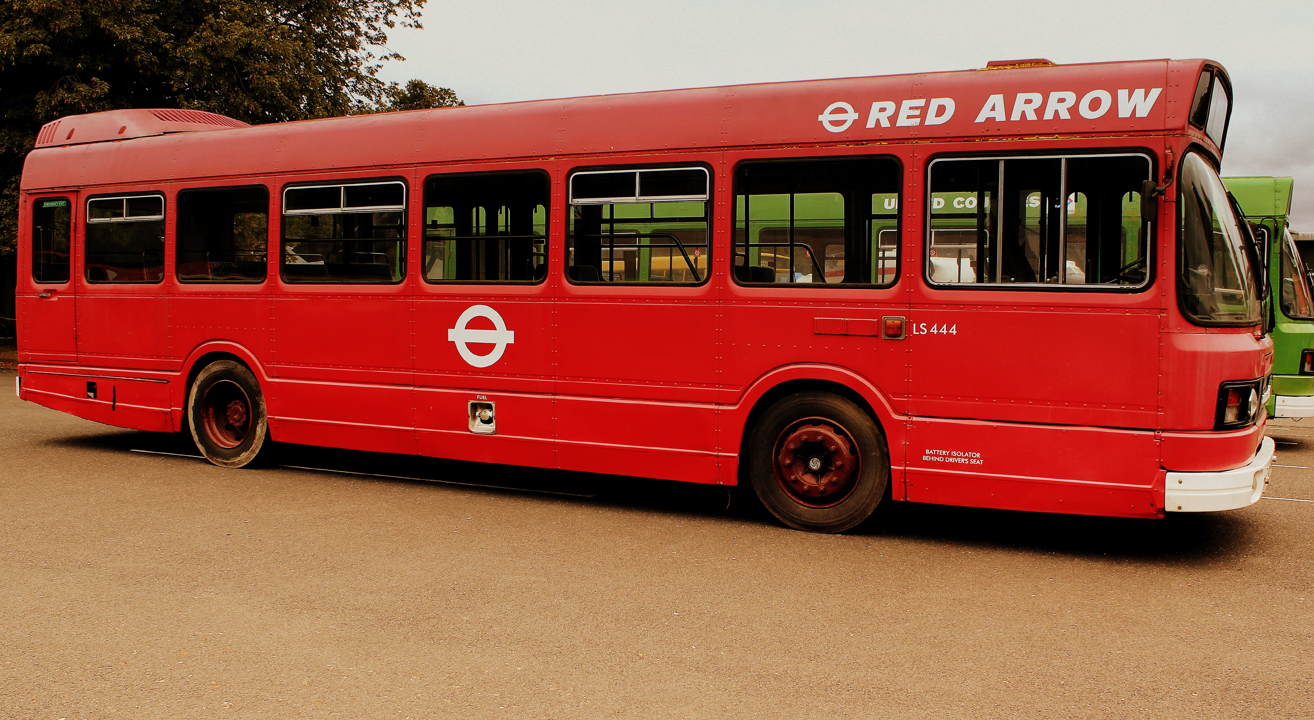 LONDON TRANSPORT LEYLAND NATIONAL RED ARROW SHOWBUS SEP 2012